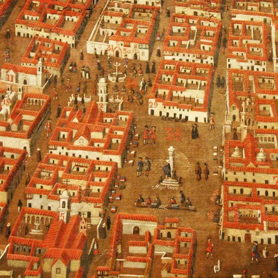 Detalle de la obra pictórica de Miguel Gaspar de Berrios. "Descripci̪ón del Cerro Rico e Imperial Villa de Potosí". 1758